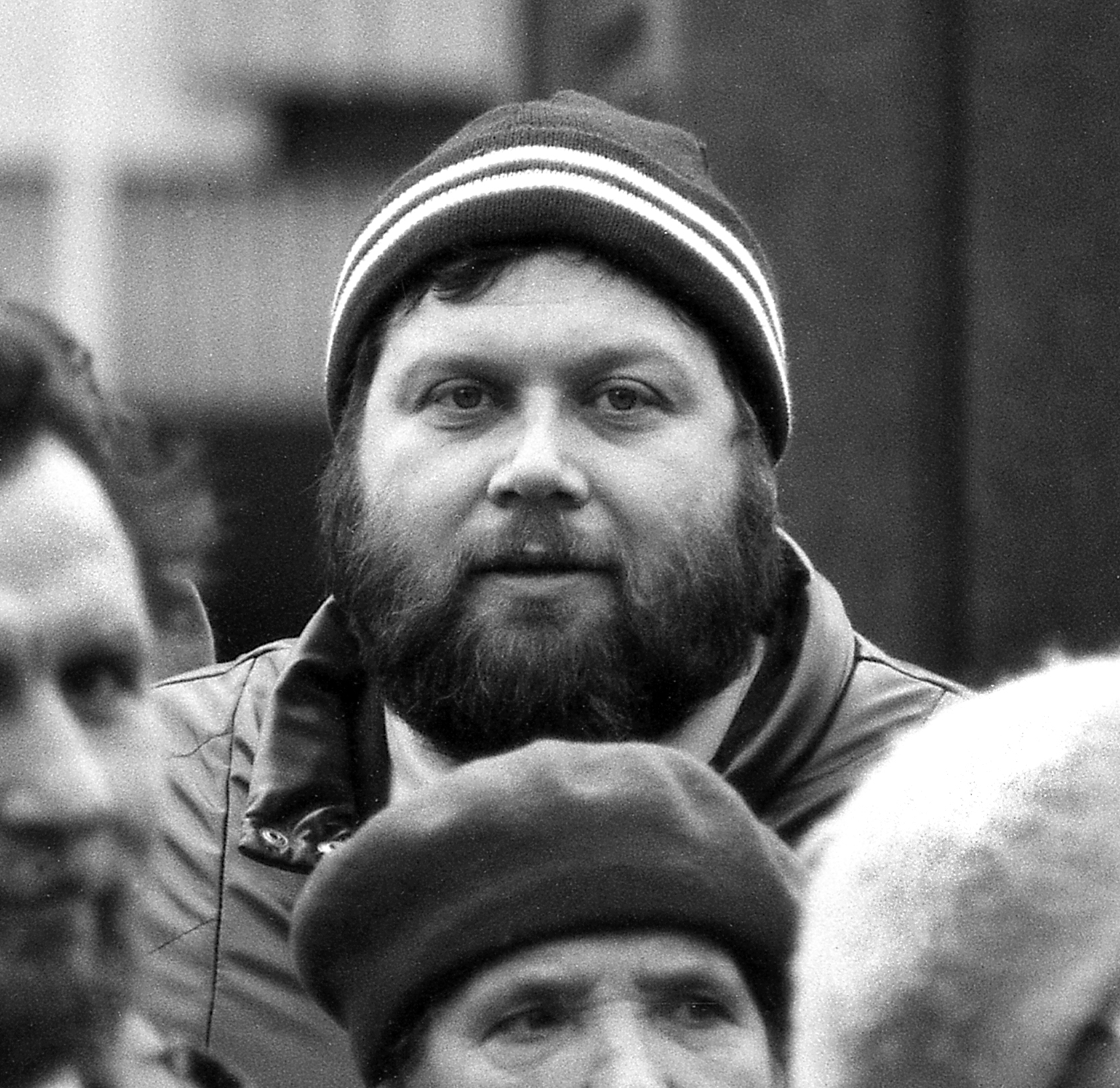 Jevgeni Kogan